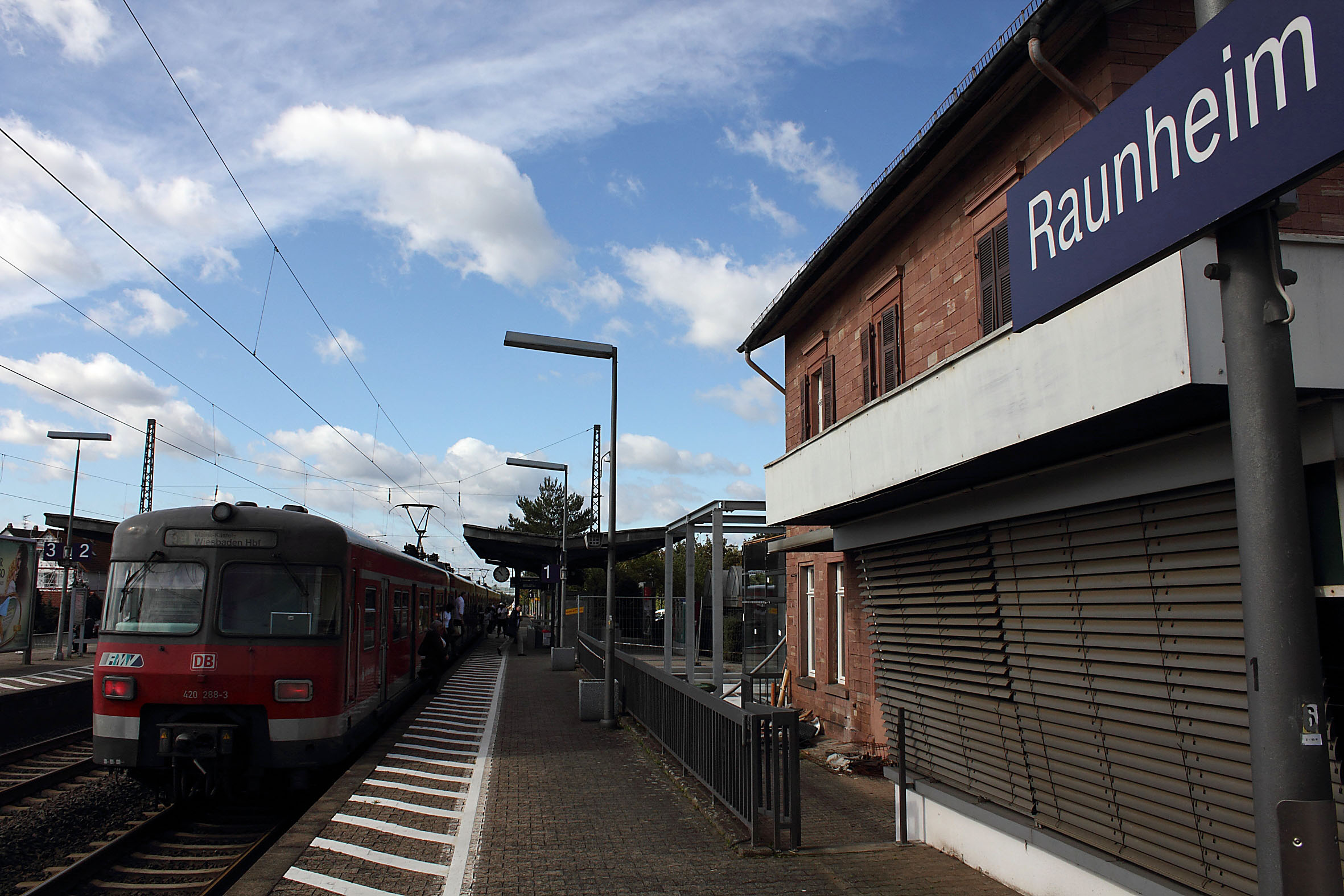 Blick auf das historische Empfangsgebäude des Raunheimer Bahnhofs und Schienennetz in Richtung Mainz / Wiesbaden. Links im Bild die S-Bahnlinie 9 Richtung Wiesbaden HBF über Mainz-Kastell.